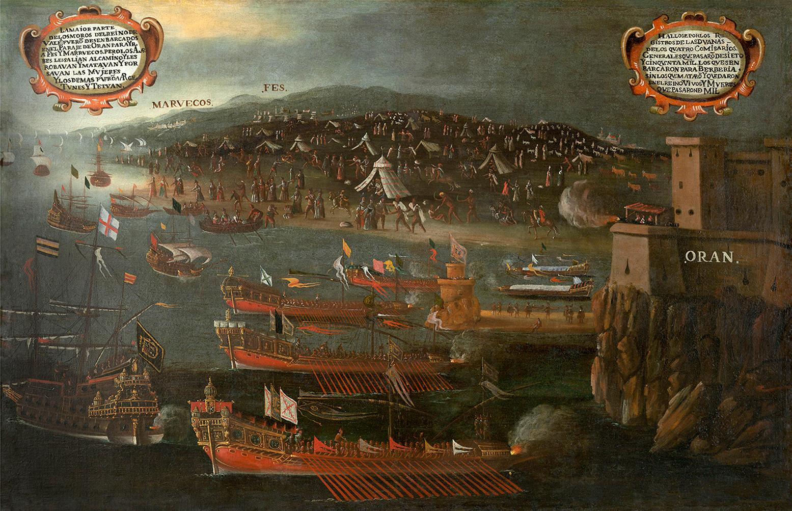 Desembarco de los moriscos en el Puerto de Orán. Pintura de Vicent Mestre.